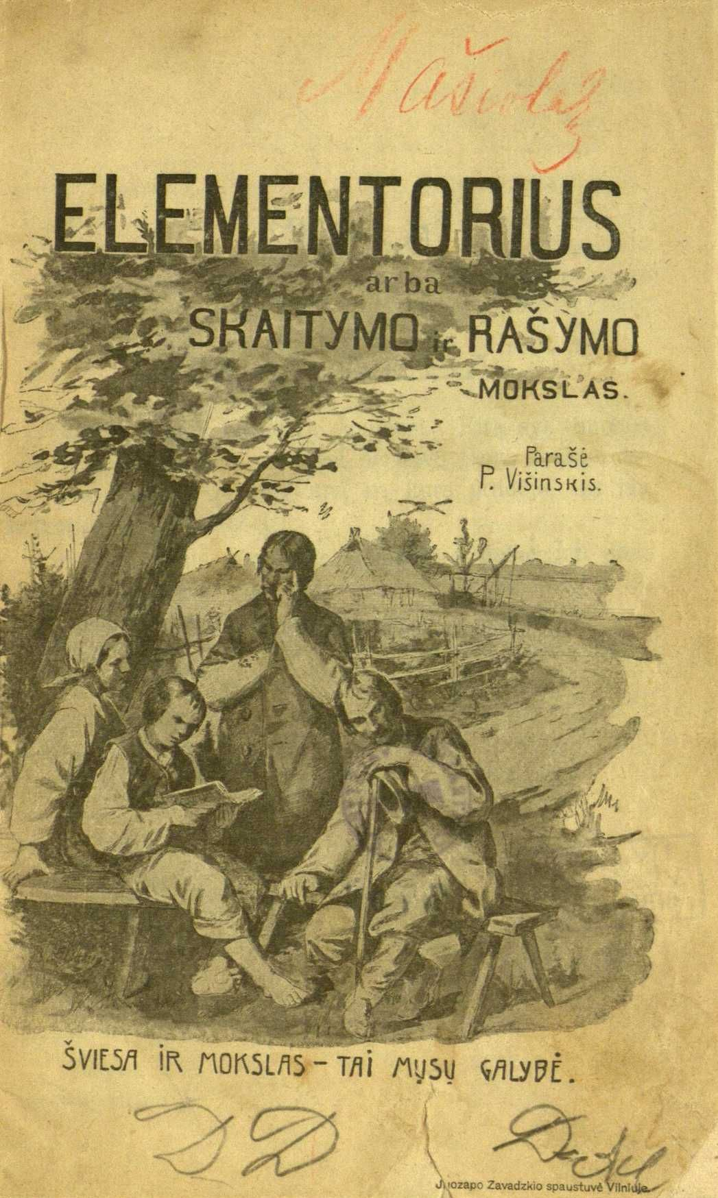 Cover page of primer by Povilas Višinskis